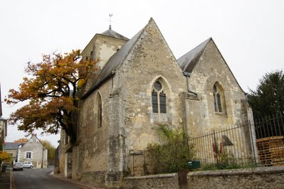 A Cheillé un chêne bicentenaire, pousse dans le mur de l'église. Le tronc et les racines de ce beau chêne pédonculé s'enfoncent à l'intérieur du mur.